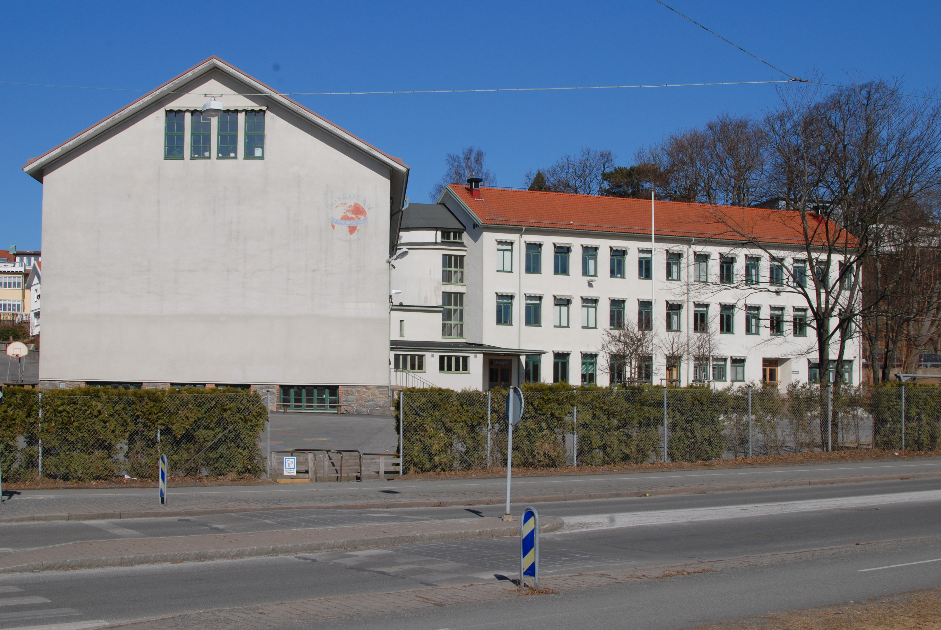 Böskolan, Danska Vägen, i Göteborg.